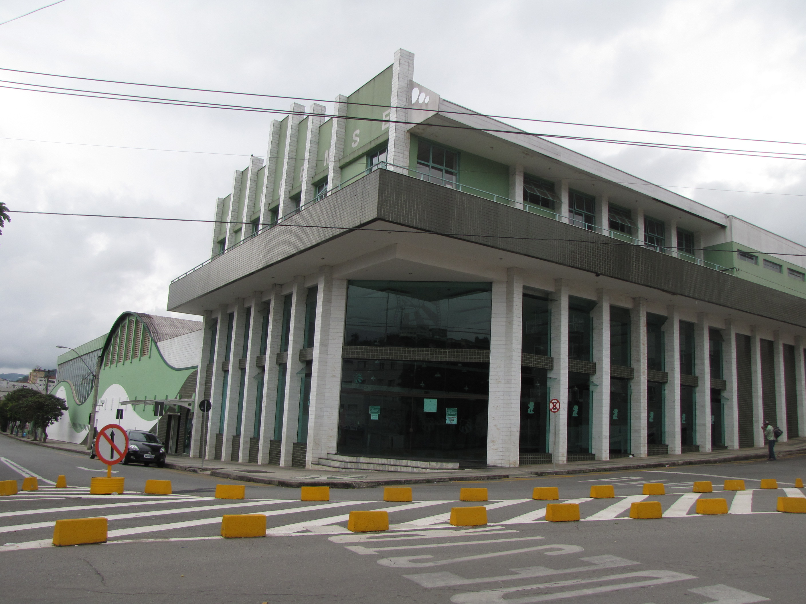 Sede da Associação Atlética Caldense visto da Praça Fonte das Rosas.